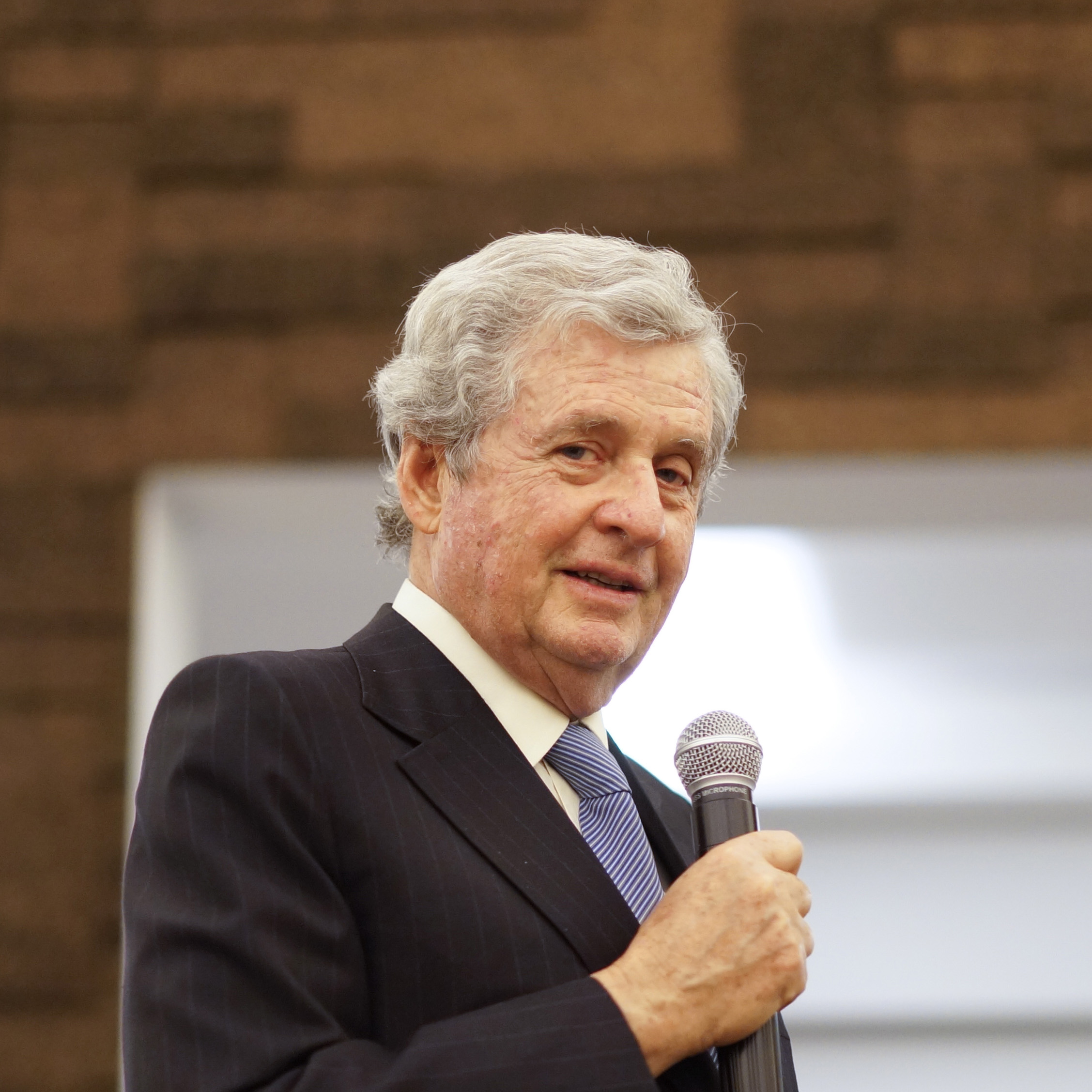 Professor João Lobo Antunes durante jantar do Serviço de Neurocirurgia